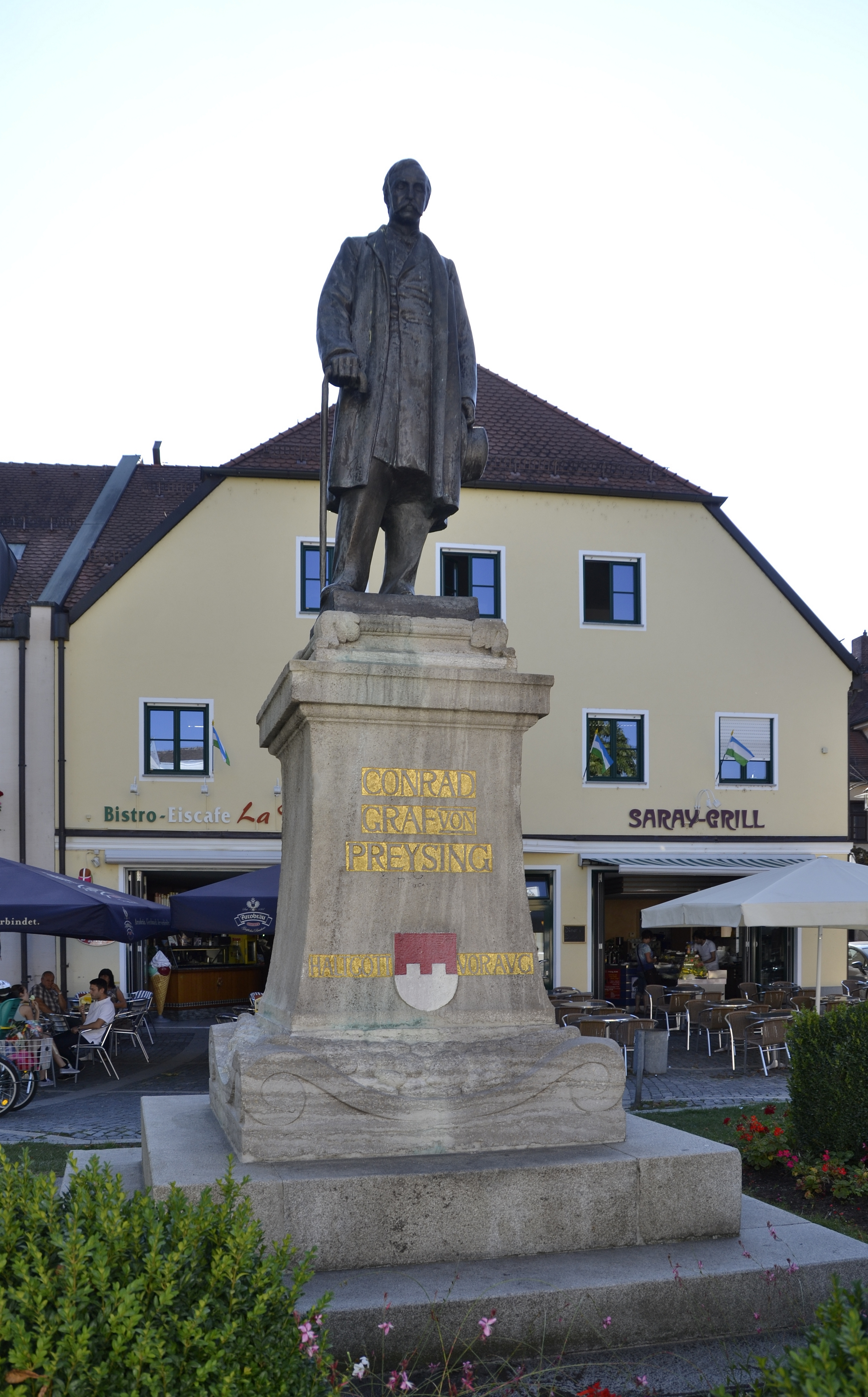 Denkmal für Conrad Graf von Preysing in Plattling, Bayern.